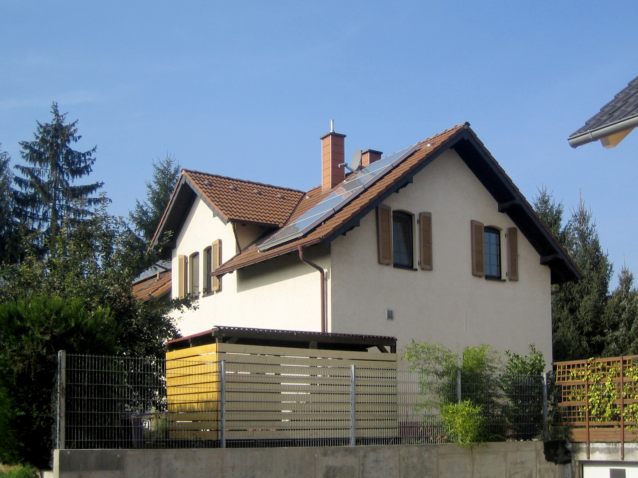 Gebäude des früheren Bf. Weingarten (Pfalz)